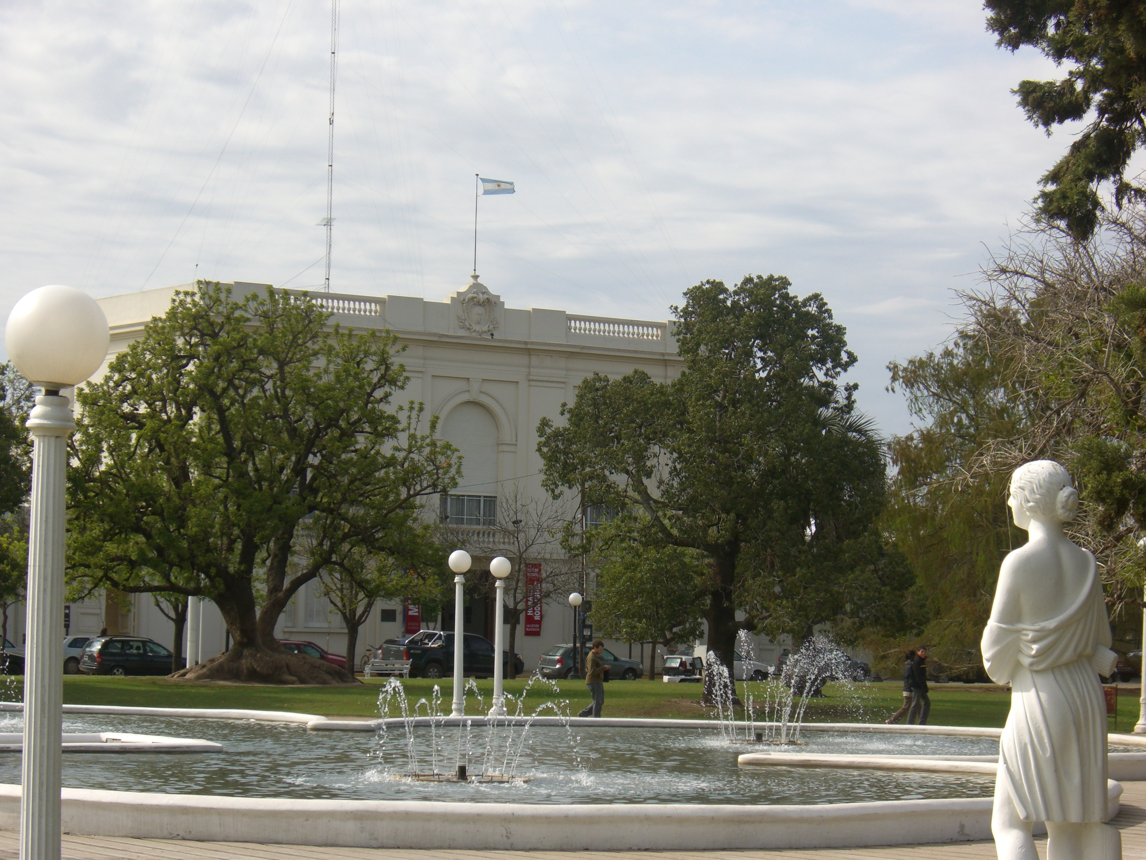 Plaza principal y fachada de la municipalidad de General Villegas.